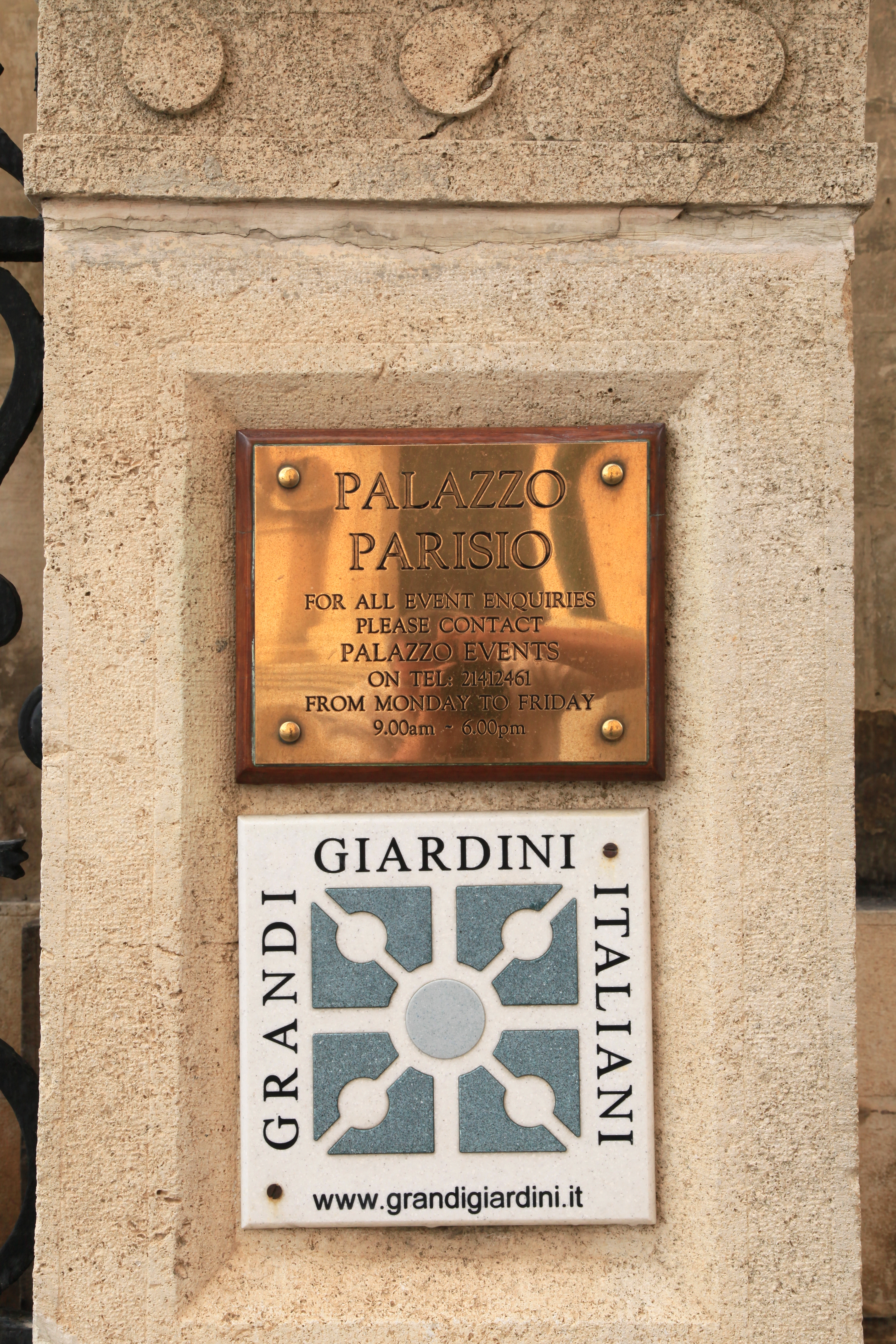 Palazzo Parisio at Triq il-Markiż Scicluna in Naxxar, Malta